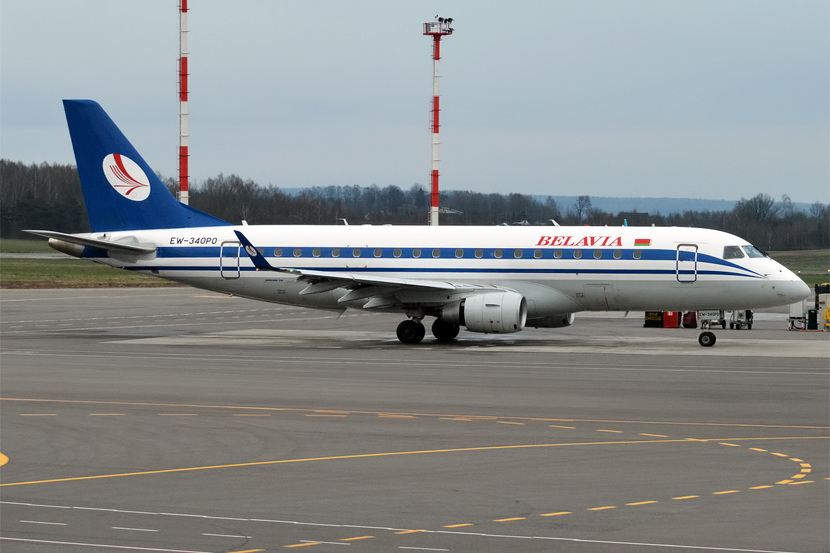 Belavia, EW-340PO, Embraer ERJ-175LR